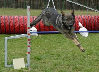 Grauer DSH beim Agility